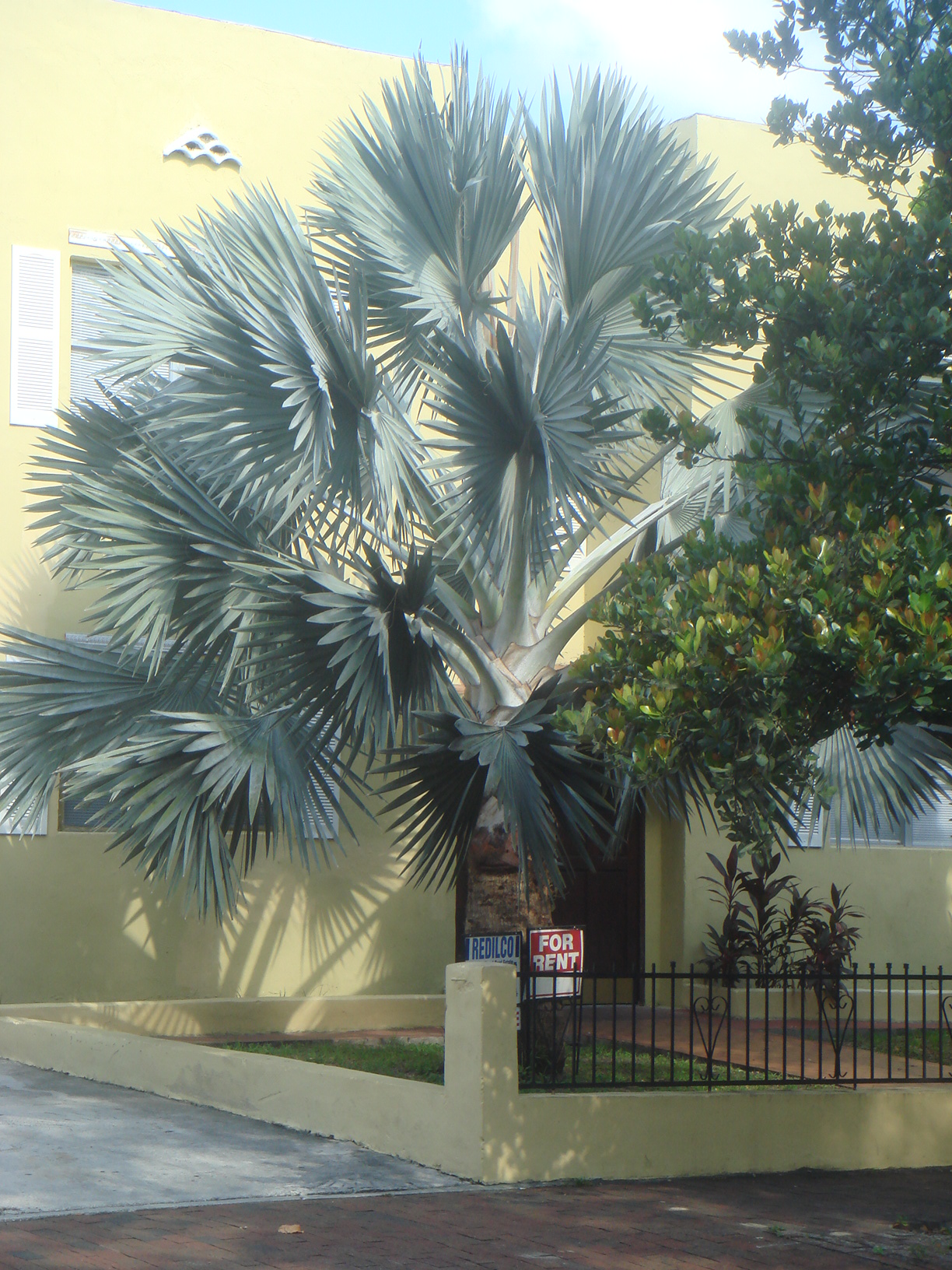 Latania azulada (Latania loddigesii), en la cercanias de la Calle Ocho, Miami, Florida, EE.UU.